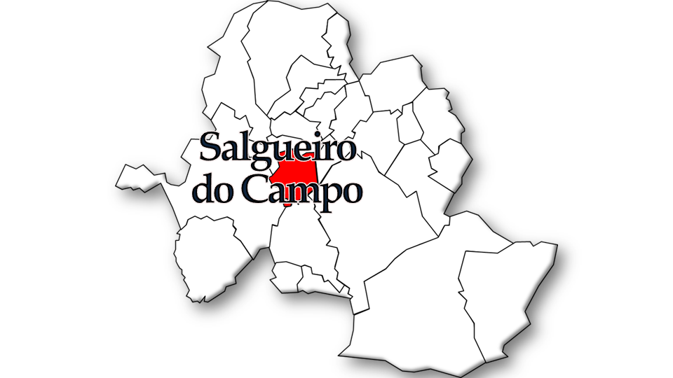 População